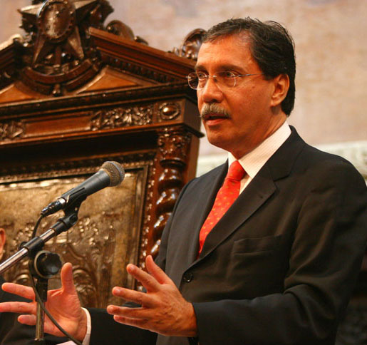 Jornalista Merval Pereira na ALERJ - Assembléia Legislativa do Estado do Rio de Janeiro